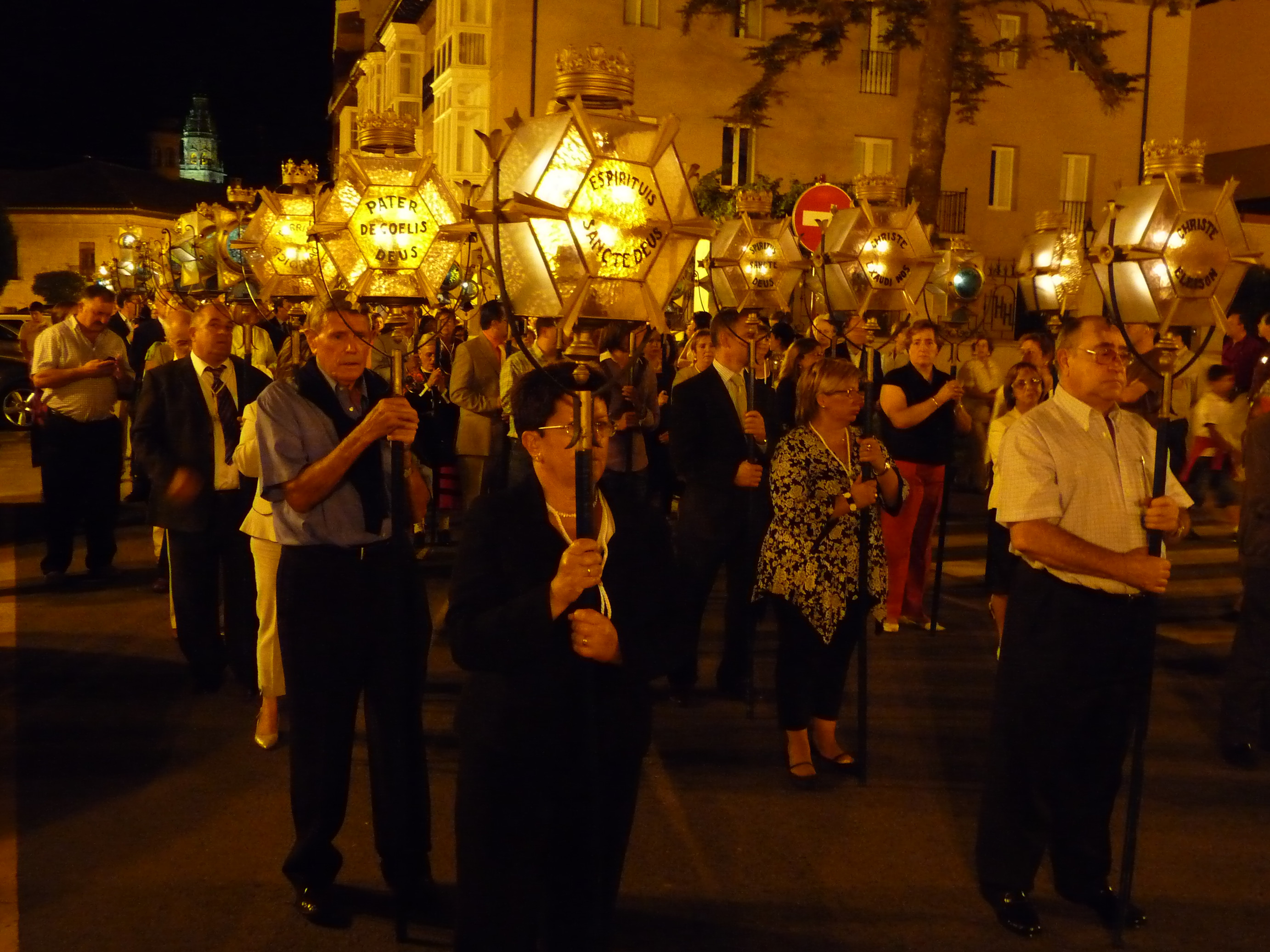 Procesión del Rosario de Faroles de Haro, La Rioja (España).